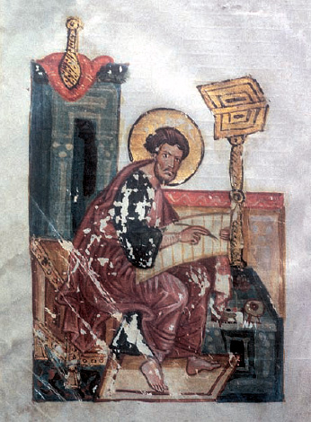 St. Luke from Orsha Gospel Book